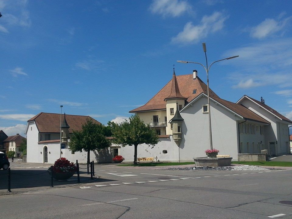 Place du Château